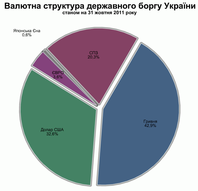 Валютна структура державного боргу України